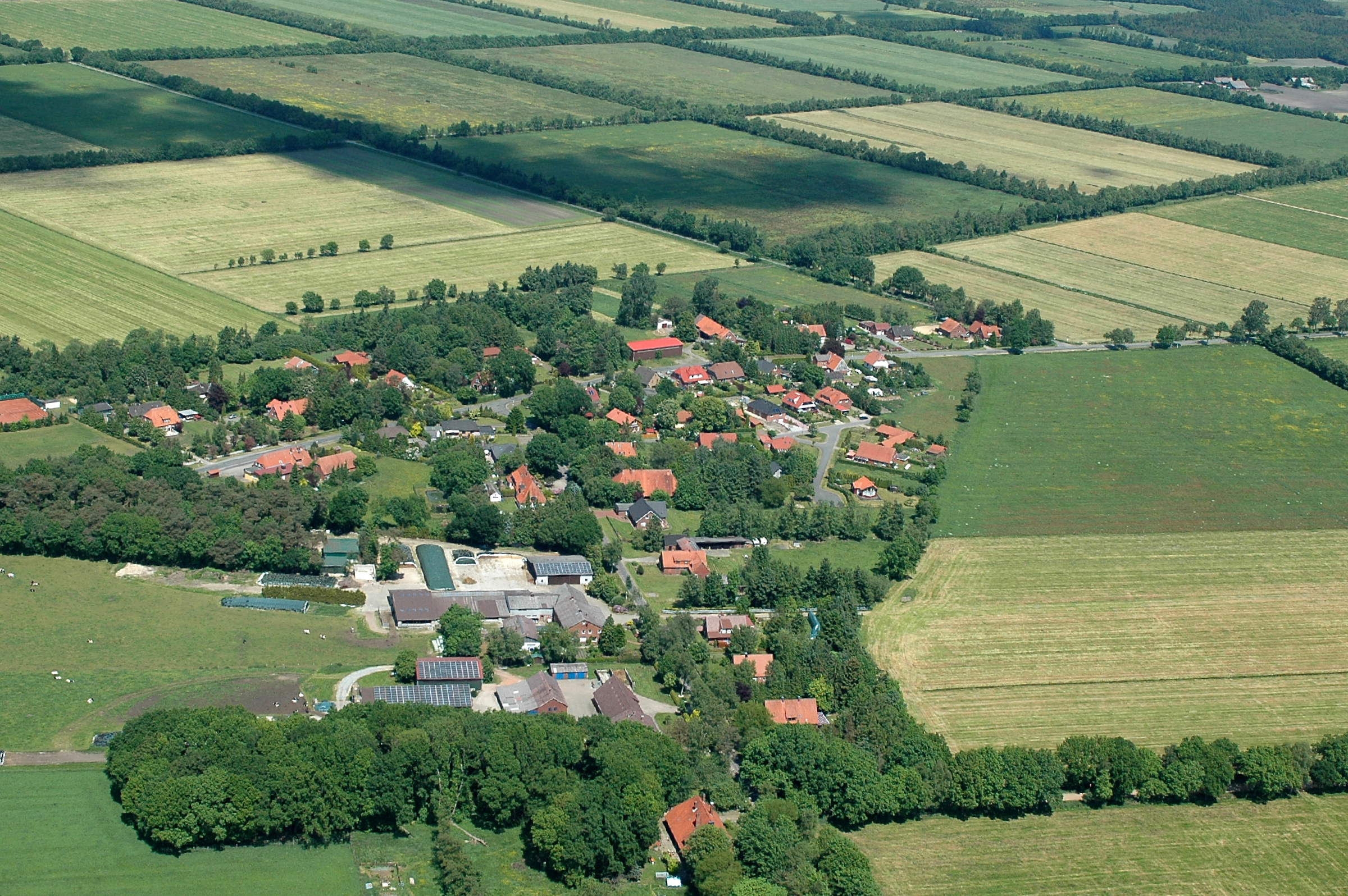 Ahlen-Falkenberg Fotoflug vom Flugplatz Nordholz-Spieka über Cuxhaven und Wilhelmshaven